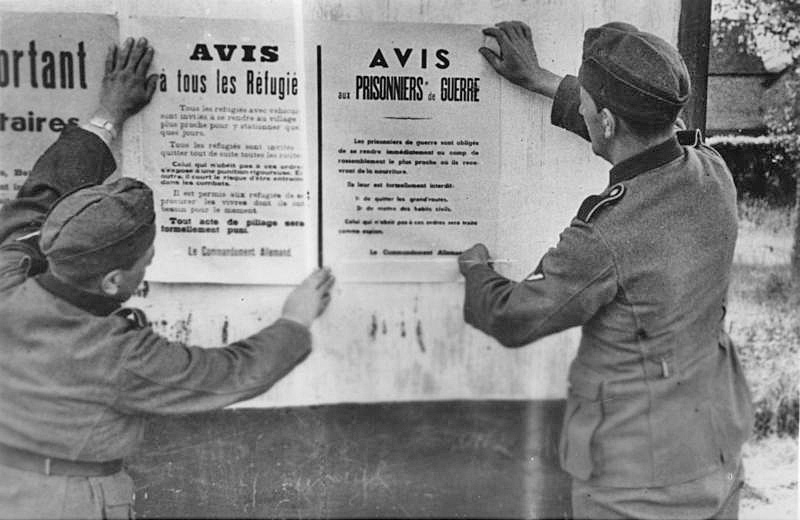 Frankreich, Ankleben von Aufrufen durch PK Frankreich: Soldaten einer Prop.Komp. [Propagandakompanie] beim Ankleben von Aufrufen im besetzten Gebiet. PK - Priese - Scherl Bilderdienst Mai 1940